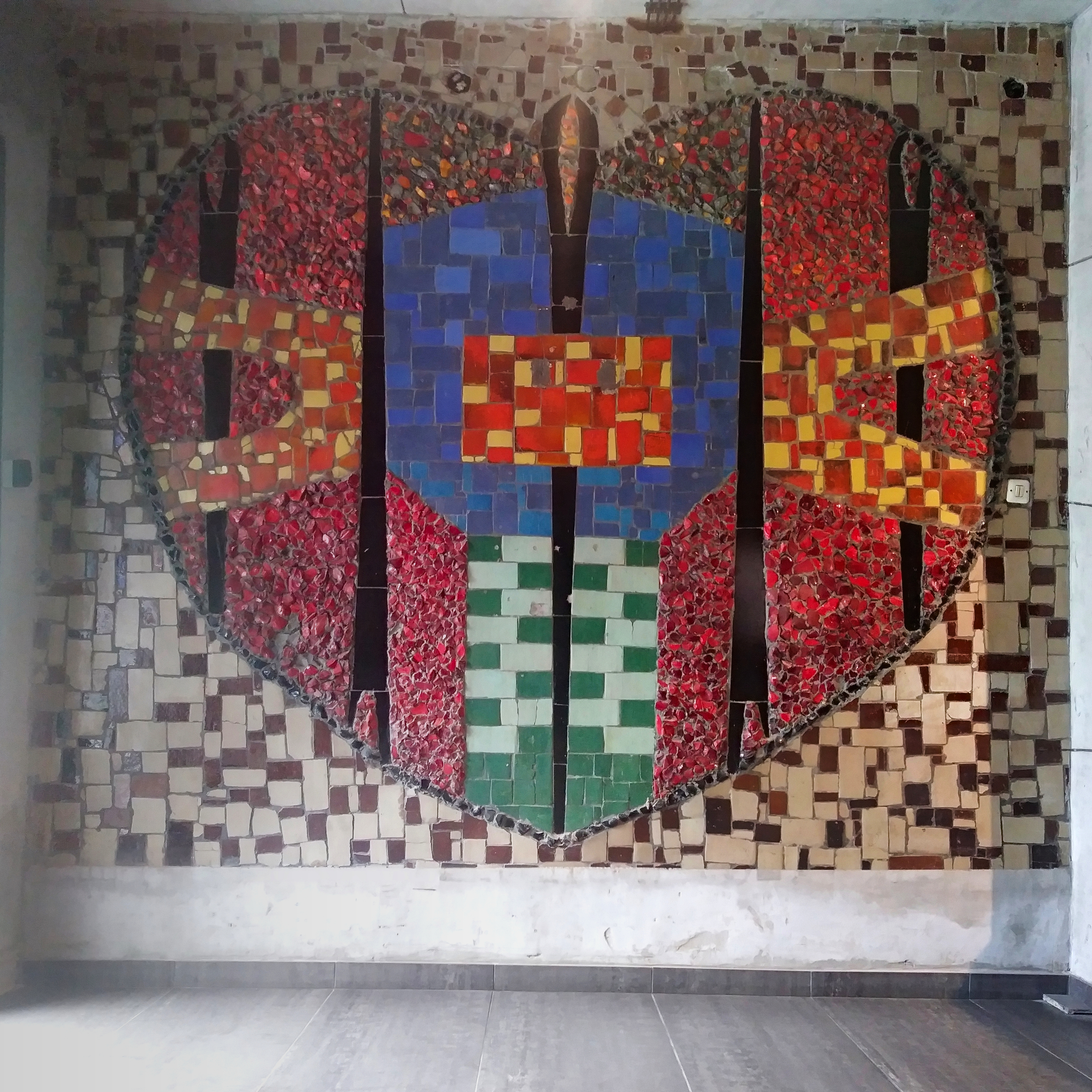 mozaika przy wejściu, na ścianie parteru dawnych Zakładów Odzieżowych Bytom (obecnie Bytom Square) w Bytomiu, przy ul. Wrocławskiej 32-34; przedstawia zapewne pięć igieł wkomponowanych w czerwone serce; zdjęcie za zgodą osoby, która pracowała wówczas w obrębie Bytom Square